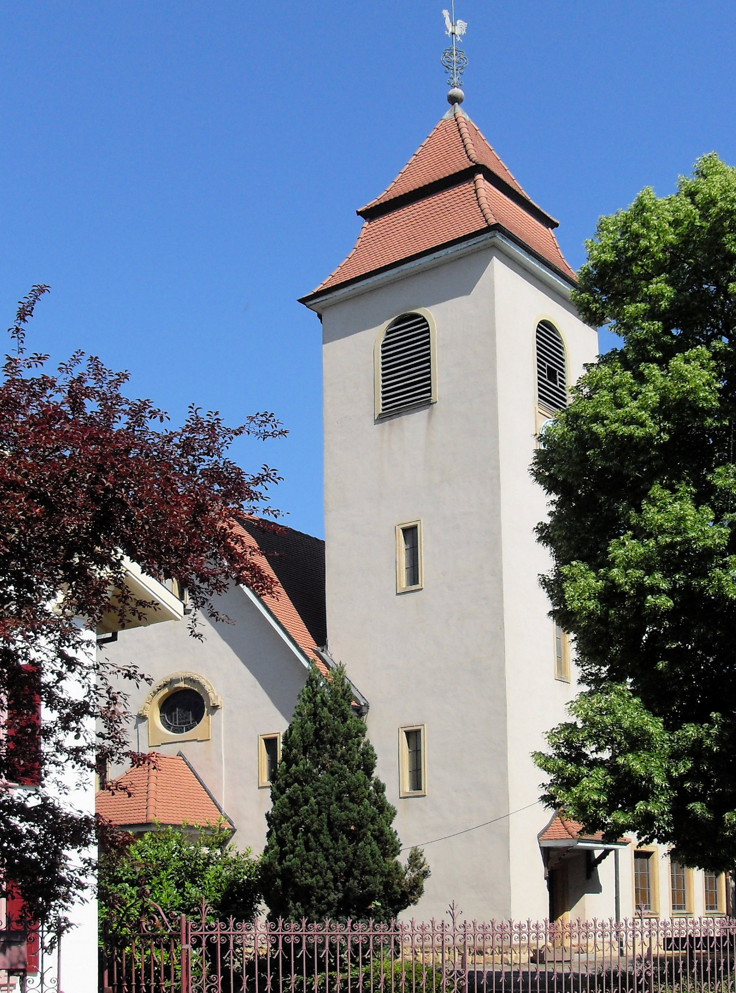 Le Temple protestant à Huningue